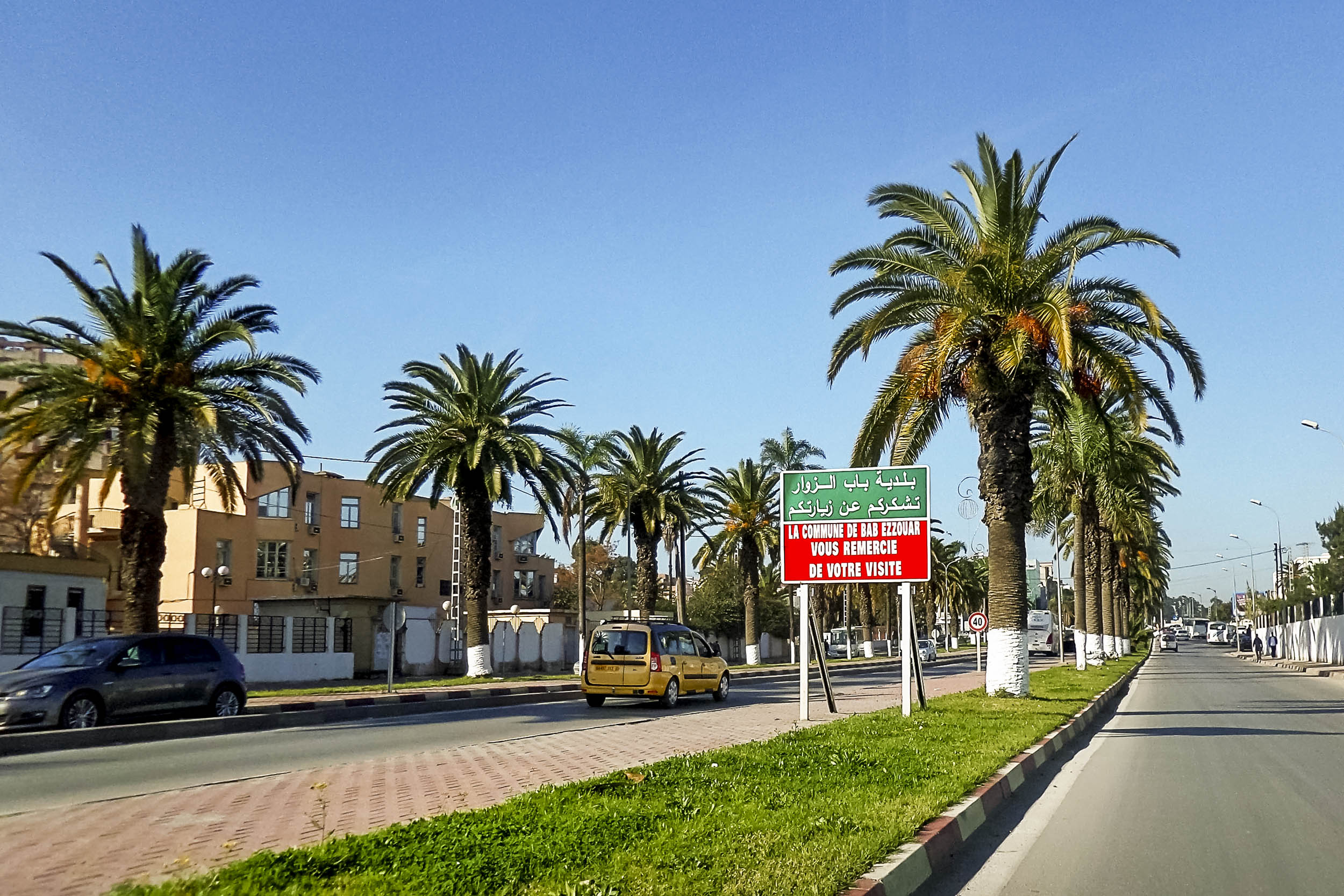 Commune de bab Ezzouar, Alger بلدية باب الزوار، الجزائر